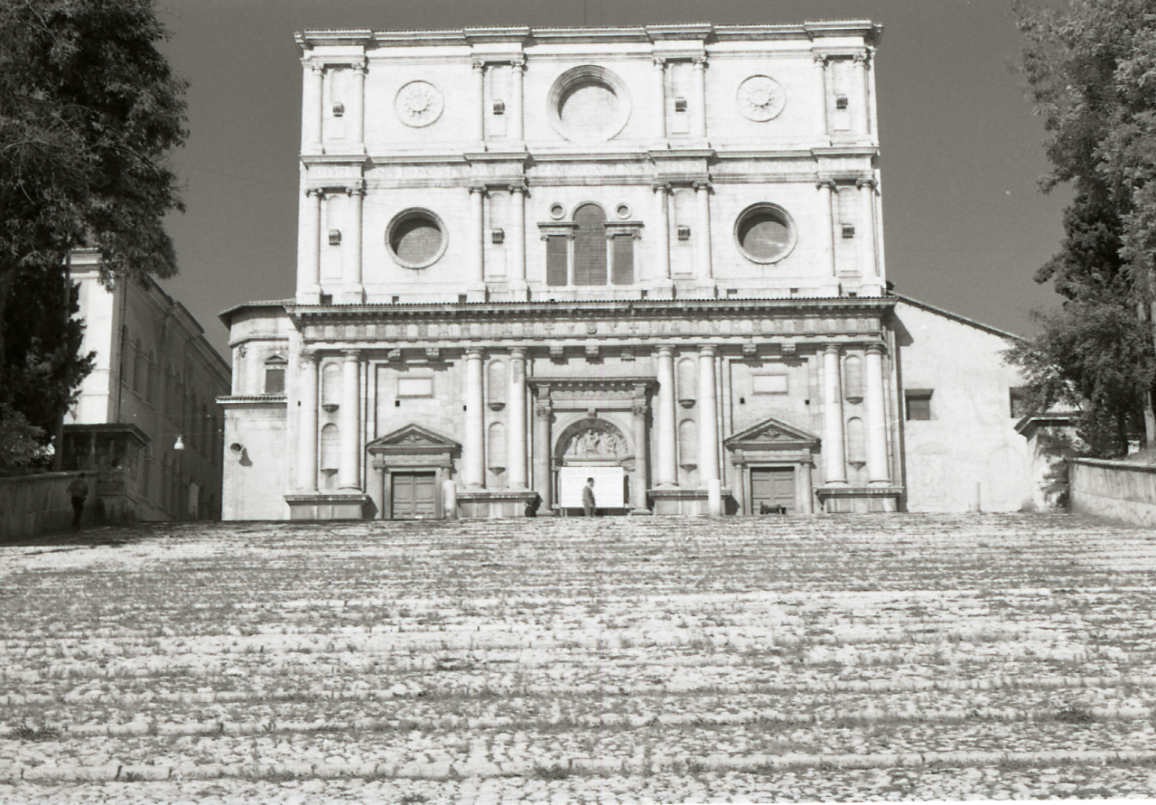 Servizio fotografico : L'Aquila, 1969 / Paolo Monti. - Strisce: 7, Fotogrammi complessivi: 37 : Negativo b/n, gelatina bromuro d'argento/ pellicola ; 35 mm. - ((I fotogrammi hanno una doppia numerazione. . - Sul portanegativi: Nikon FP4. - Sul dorso del portanegativi Monti specifica: "Abruzzo.". - Occasione: Documentazione per la pubblicazione: "TOURING CLUB ITALIANO, Abruzzo e Molise, Milano, TCI, 1970". - Fonte: Agenda di Paolo Monti: Monti/ 3 aprile 1966 - 9 marzo 1971/ 12421-16823 (1966-1971), presso Archivio Paolo Monti. - Fonte: Monografia: TOURING CLUB ITALIANO, Abruzzo e Molise, Milano, TCI, 1970 (1970)